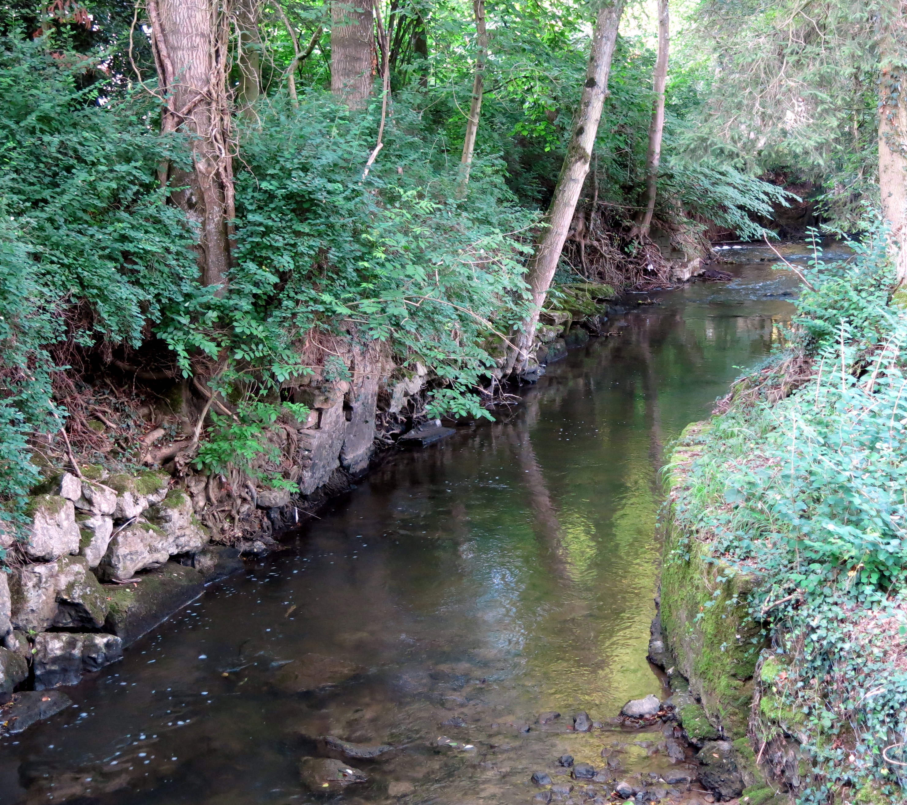 D'Mamer am Gemengepark zu Miersch.